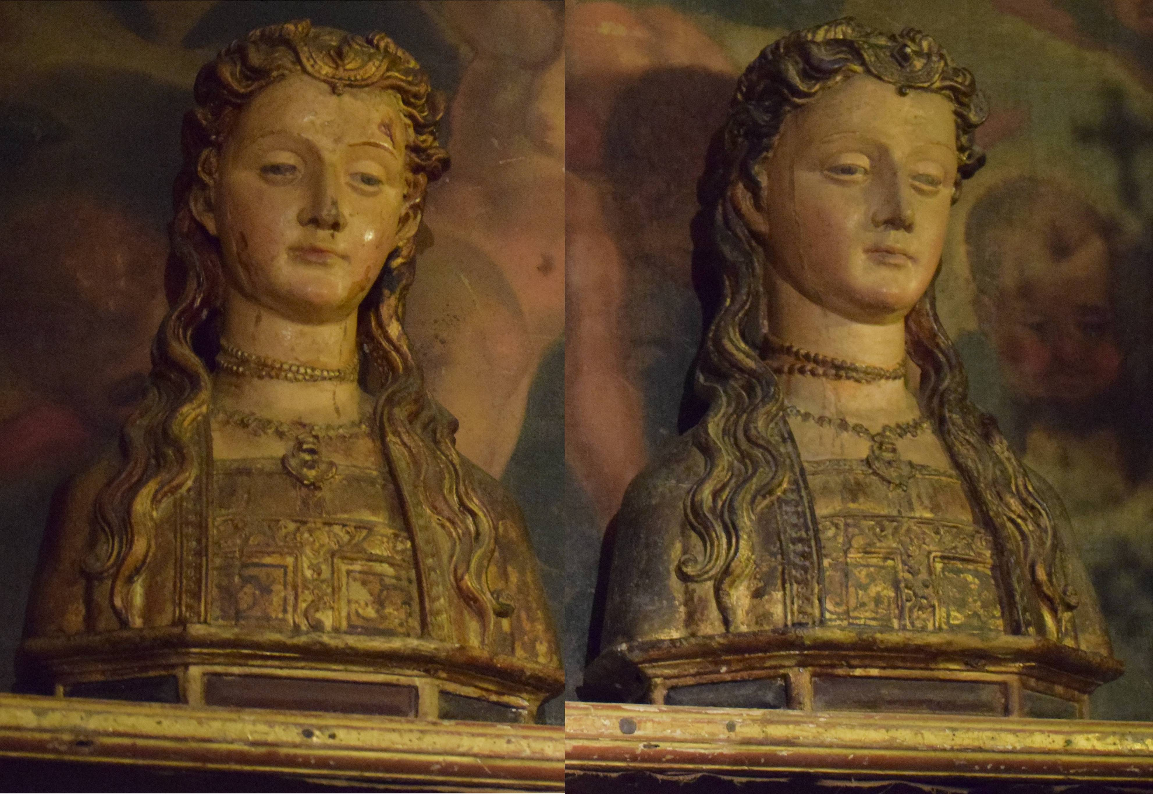 Relicarios del séquito de Santa Úrsula y las Once Mil Vírgenes, Sanlúcar de Barrameda, Santuario Basílica Virgen de la Caridad, 1520-1530, regalo del Emperador Carlos V al VI duque de Medina Sidonia